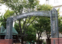 大阪女学院南門